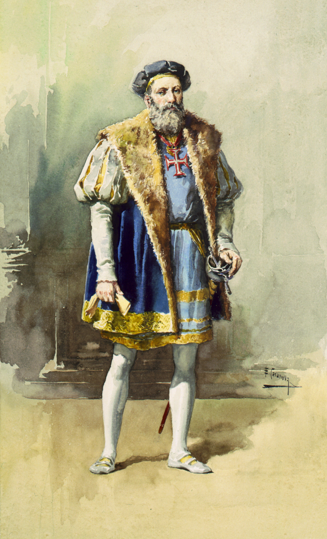 Vasco da Gama, navegador e explorador português.